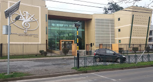 La escuela en junio de 2016